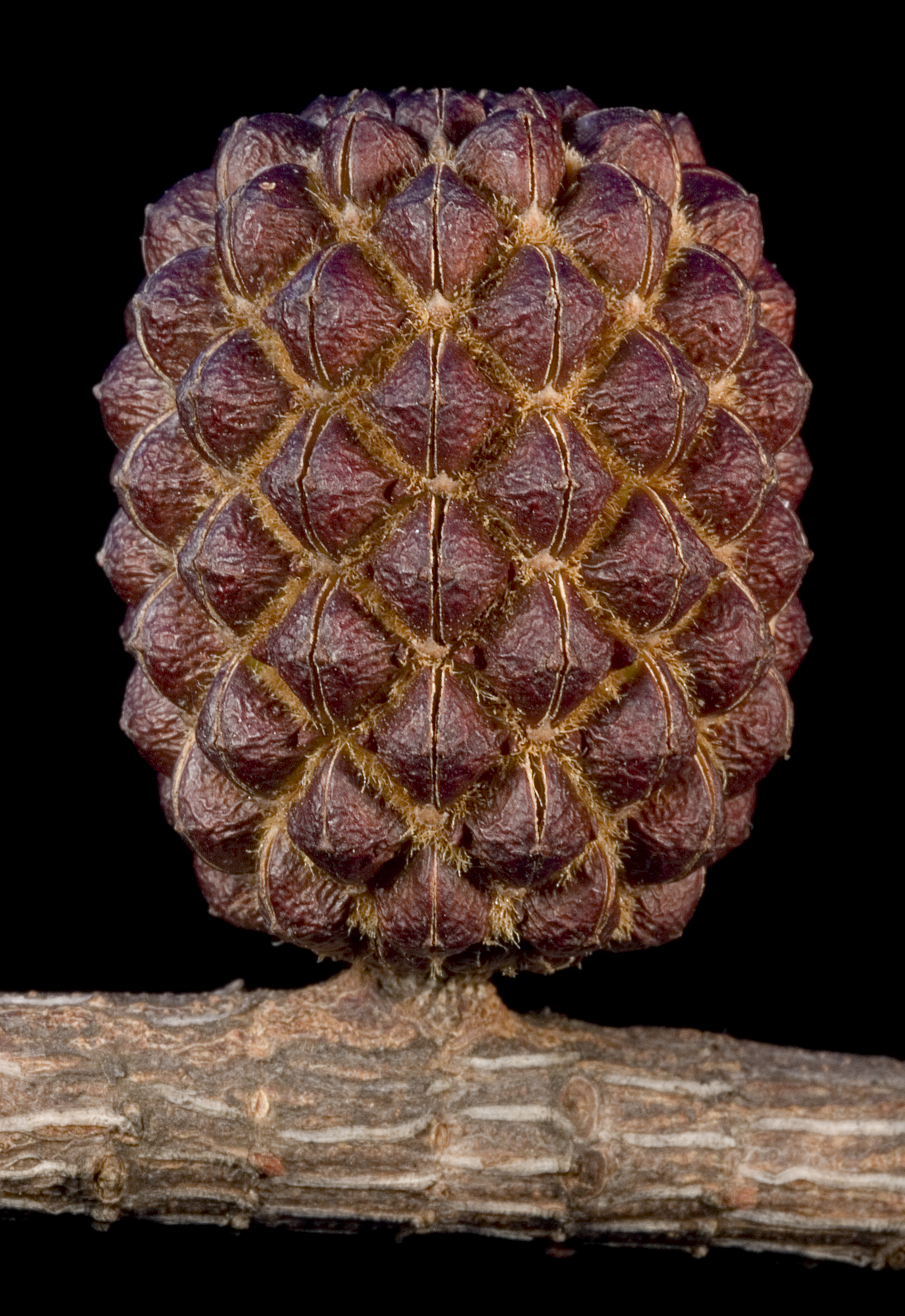 KRT3208